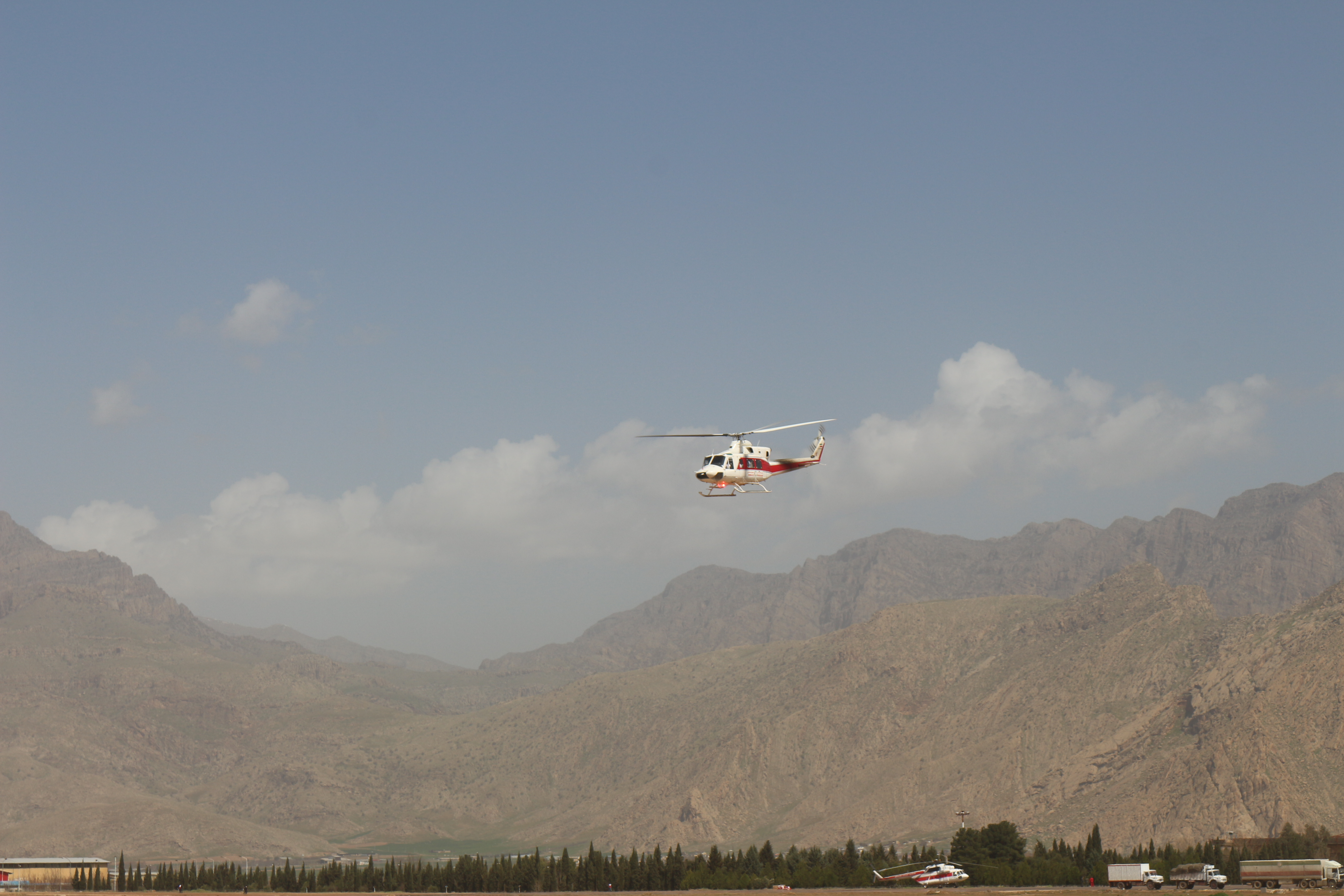 در حال امداد رسانی از فرودگاه خرم آباد به سیل زدگان استان لرستان 1398